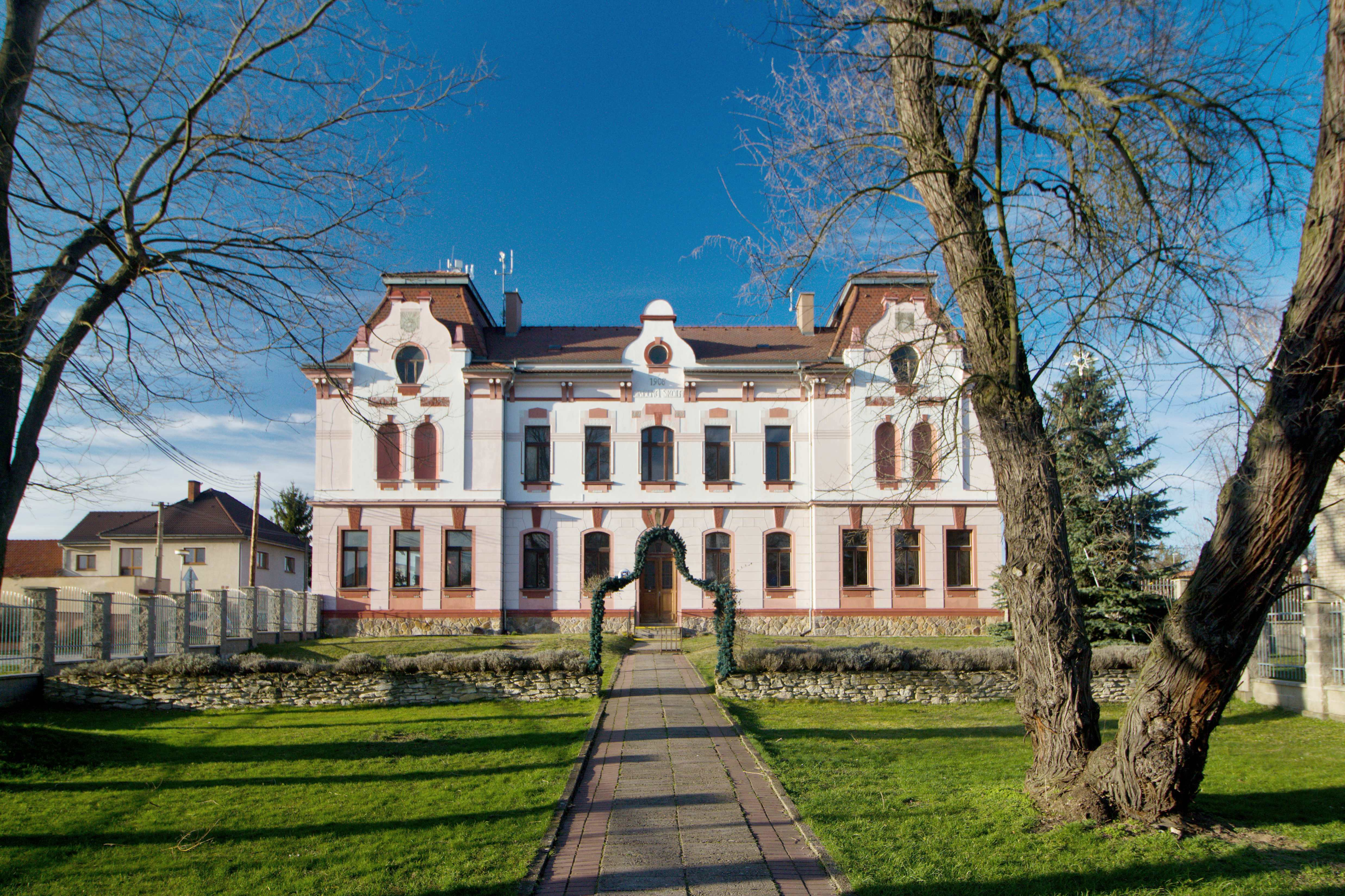 Ostrá nad Labem, okres Nymburk